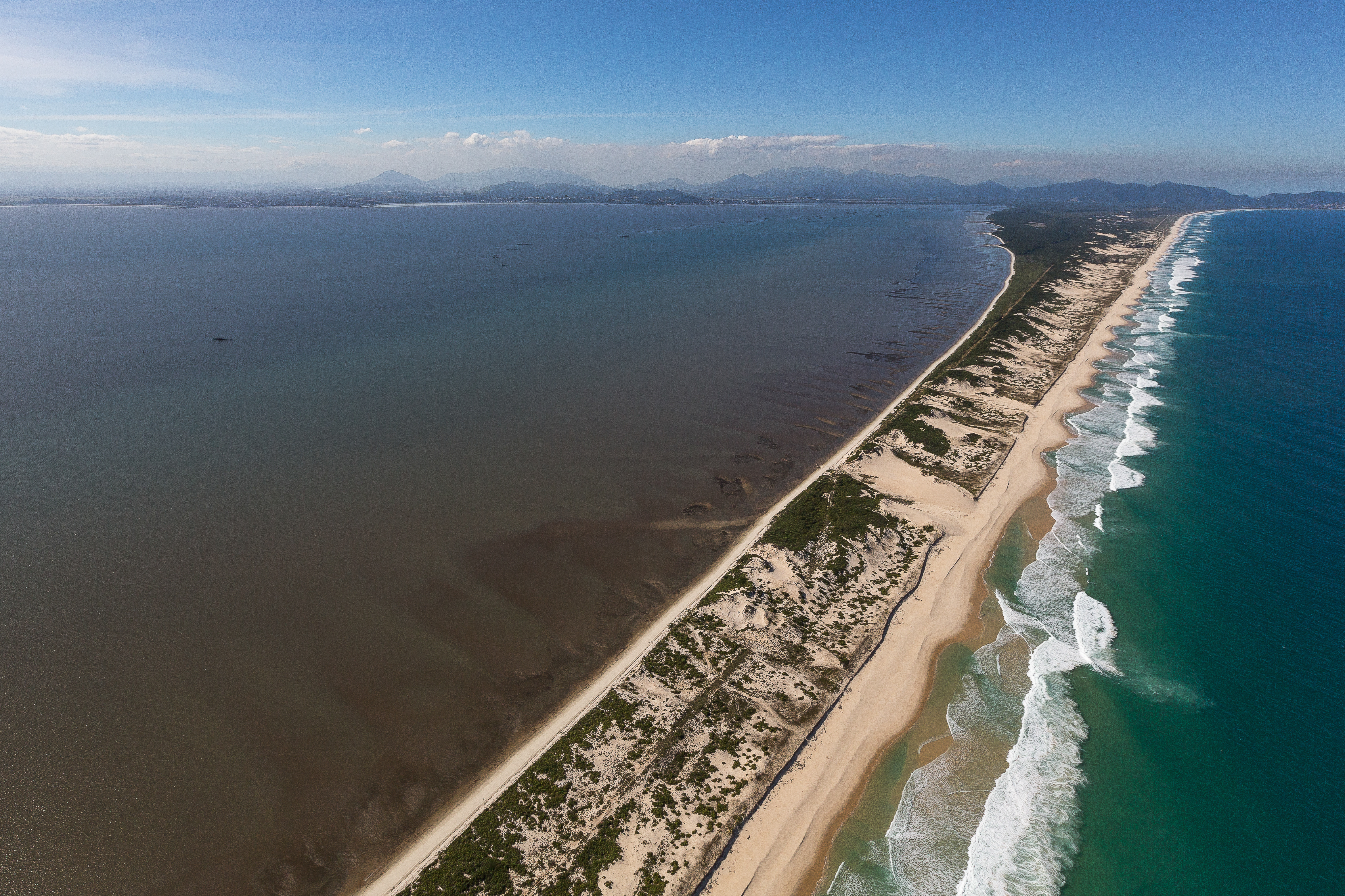 Vista aérea da Restinga da Marambaia, Barra de Guaratiba, Rio de Janeiro - RJ - Brasil.